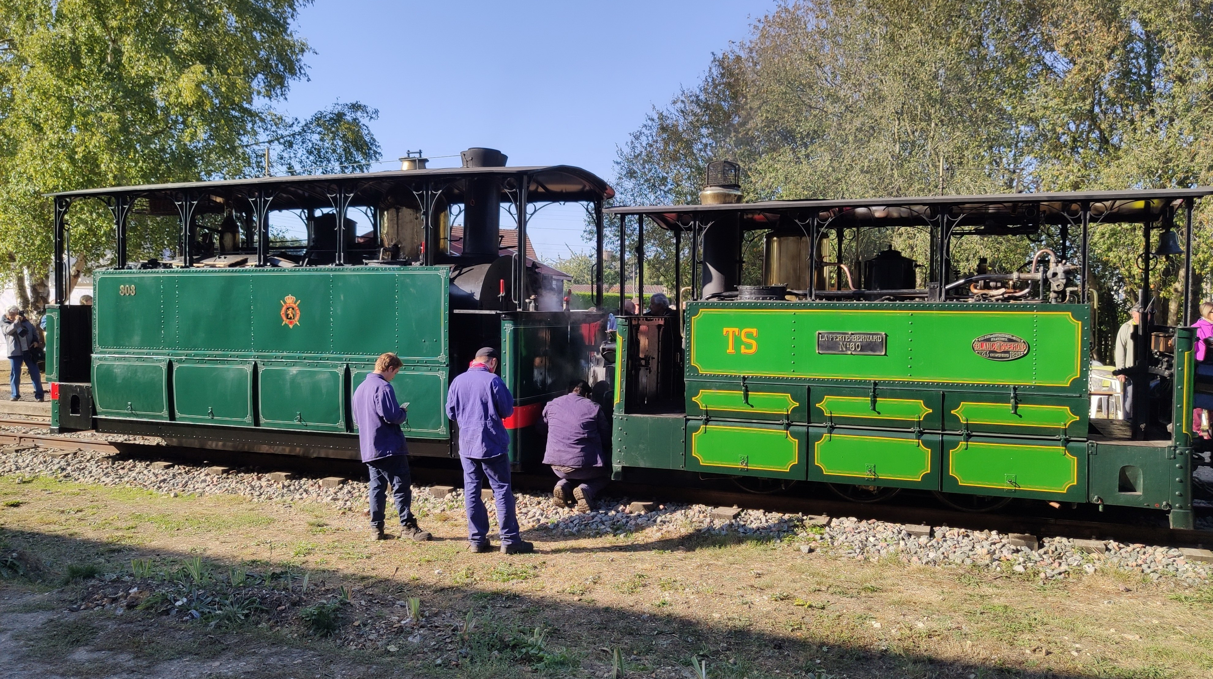 Locomotives bicabine : 030T, no 60, "La Ferté-Bernard", Blanc Misseron (1898), des Tramways de la Sarthe, préservée par le MTVS Locomotive vapeur bi-cabine Type 7 de La Métallurgique à Tubize, préservée par l'ASVI le 21 septembre 2019 à la gare de Crèvecoeur-le-Grand pour les Journées du Patrimoine